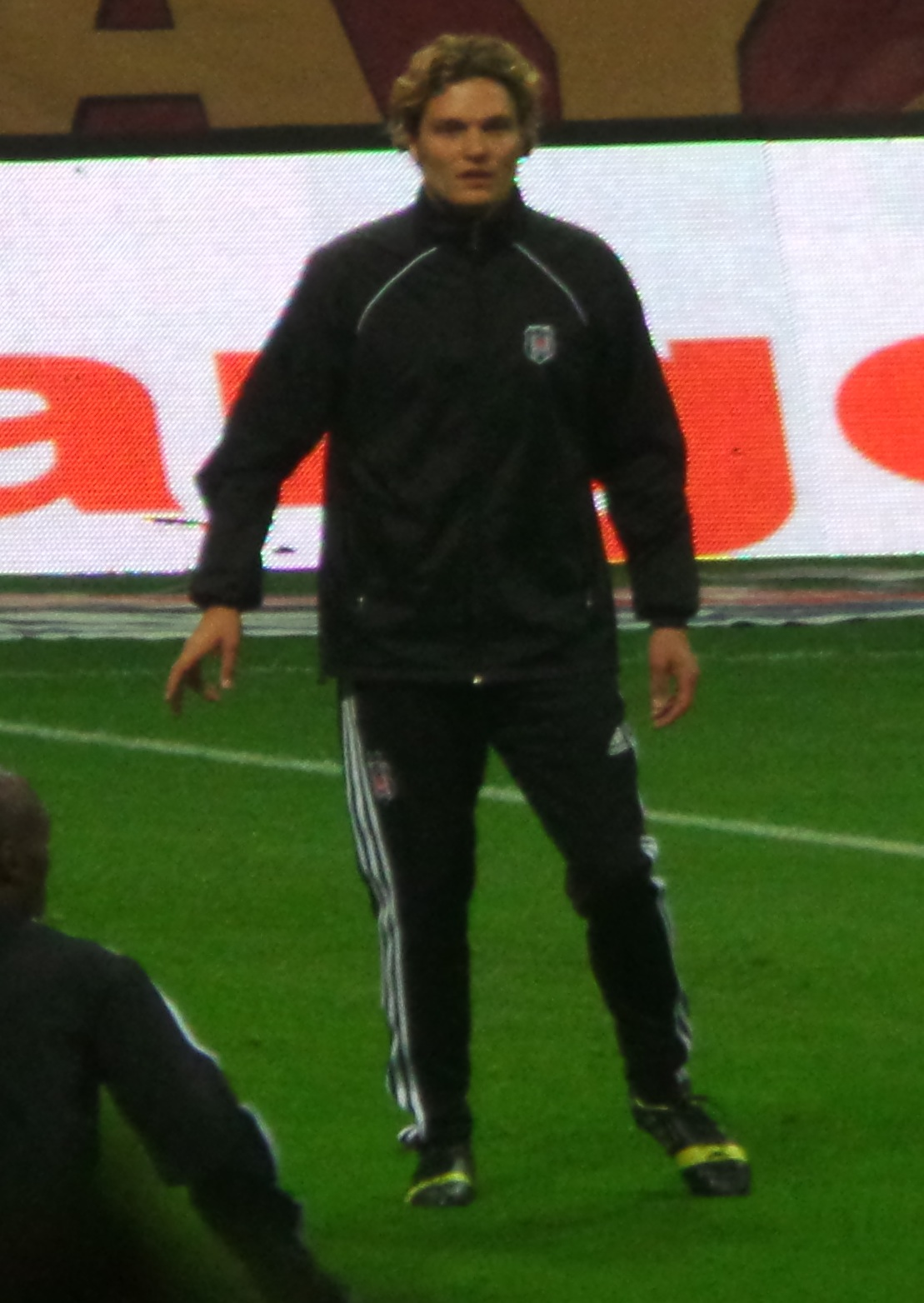 Edin Terzic